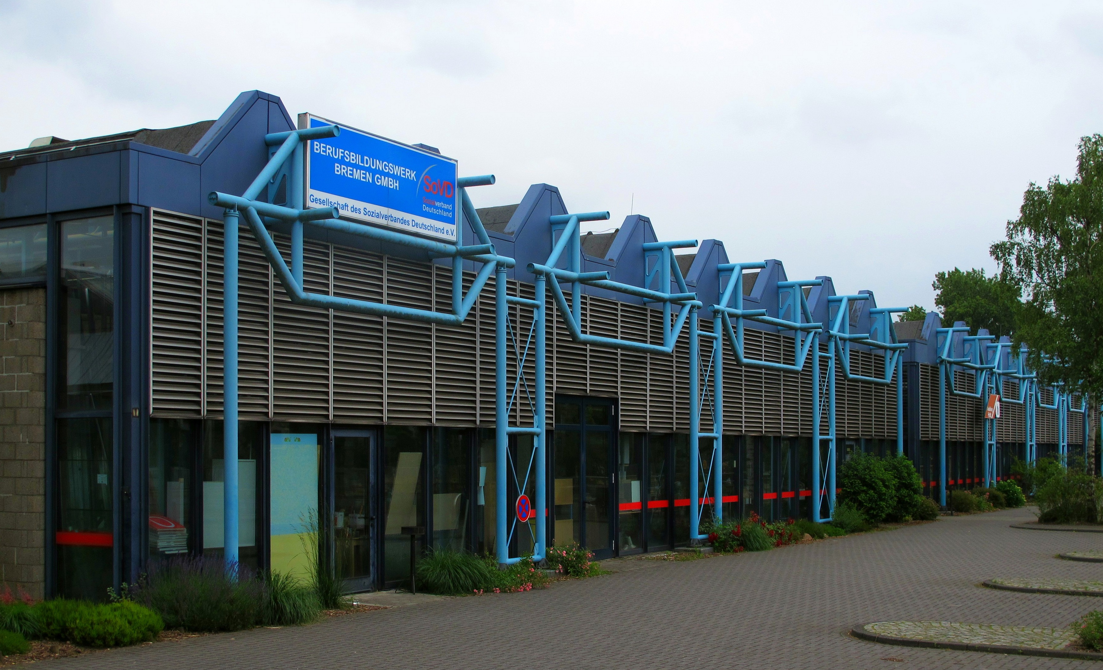 Berufsbildungswerk Bremen, Werkstattgebäude an der Universitätsallee, Bremen im Juni 2016; Stadtteil: Horn-Lehe; Ortsteil: Lehe; Baujahr: 1976-78